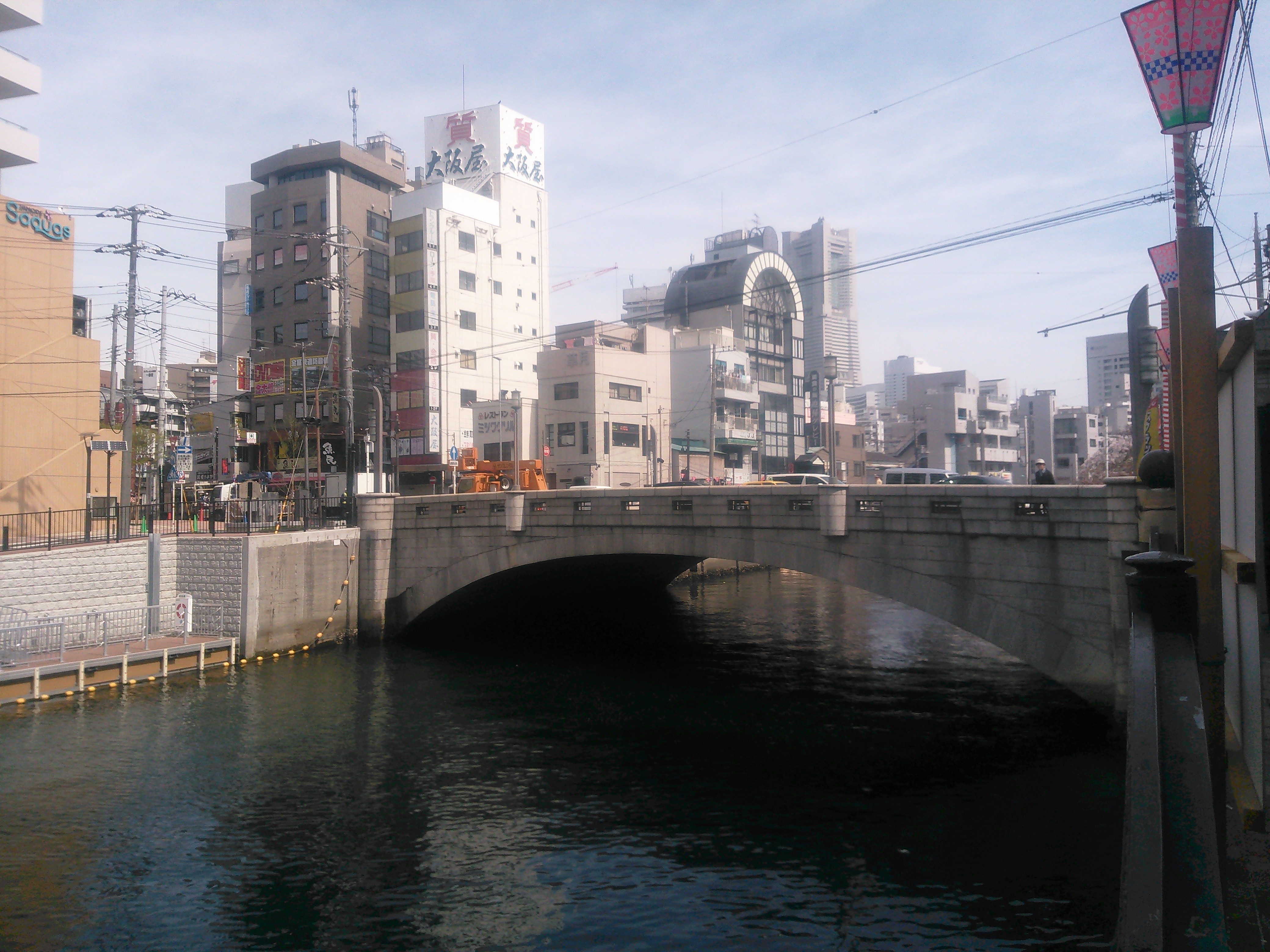 大岡川に架かる長者橋。右岸の長者町9丁目から下流（北）方向を見る。